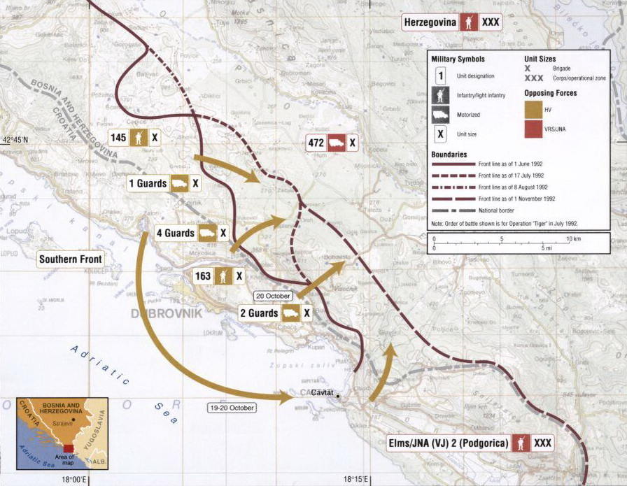 Završne operacije u deblokadi Dubrovnika